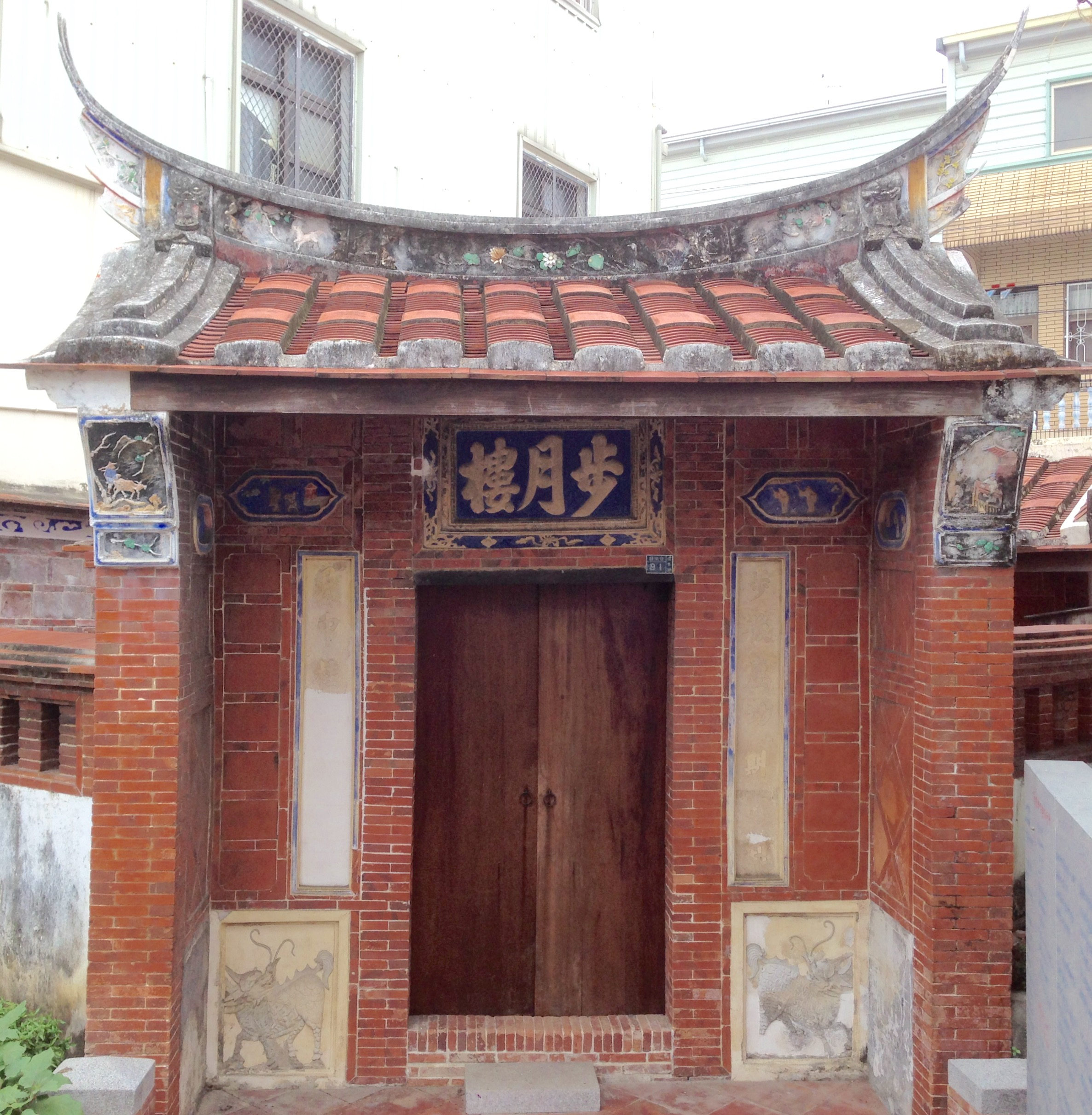 中文（台灣）: 佳冬步月樓